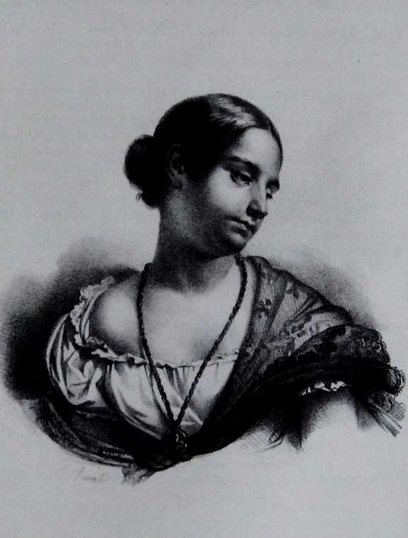 Raffigurazione della Dottoressa Maria Dalle Donne